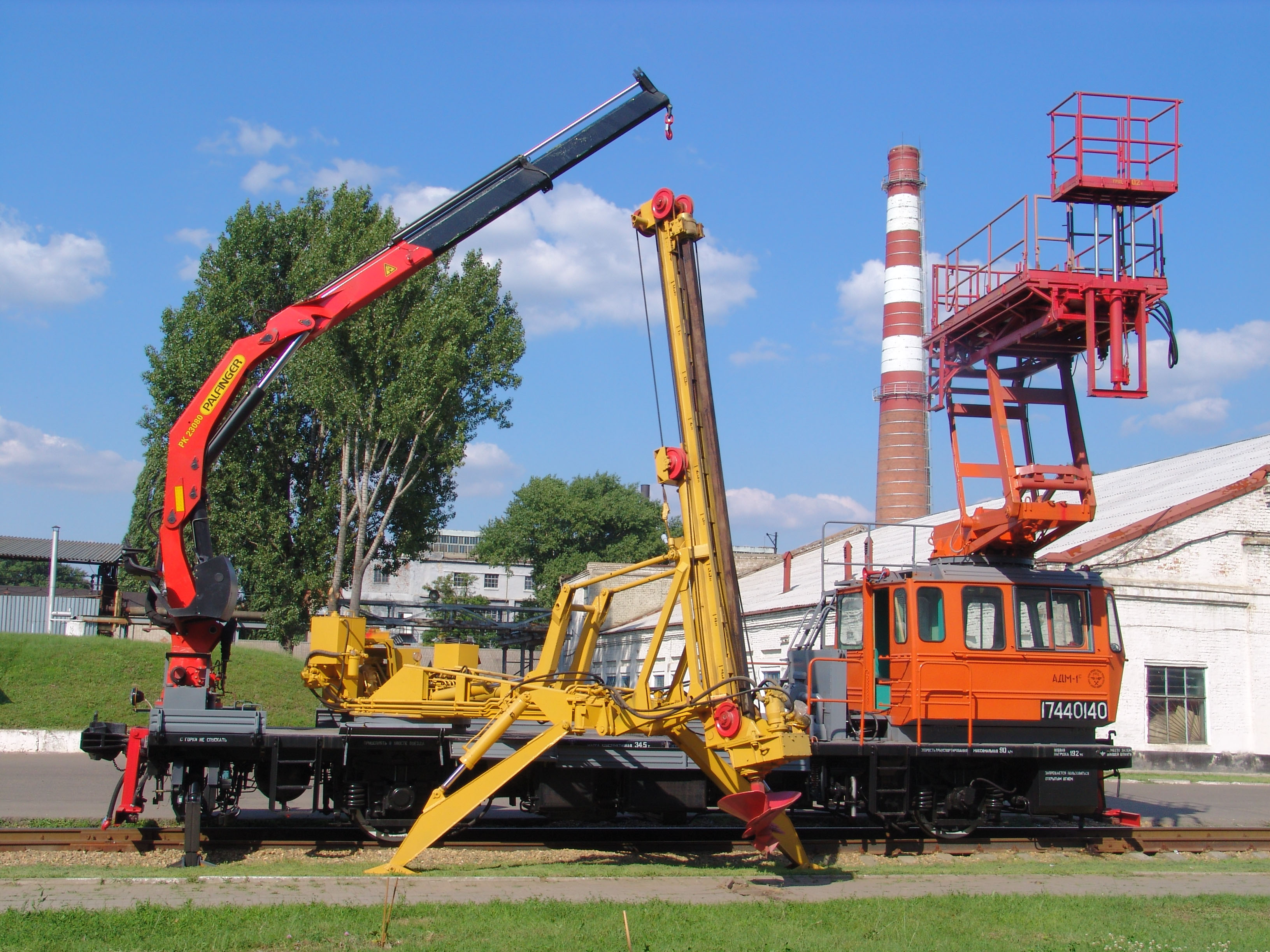 Монтажно-восстановительная автомотриса АДМ-1С, производства ОАО Тихорецкий машиностроительный завод им. В.В. Воровского